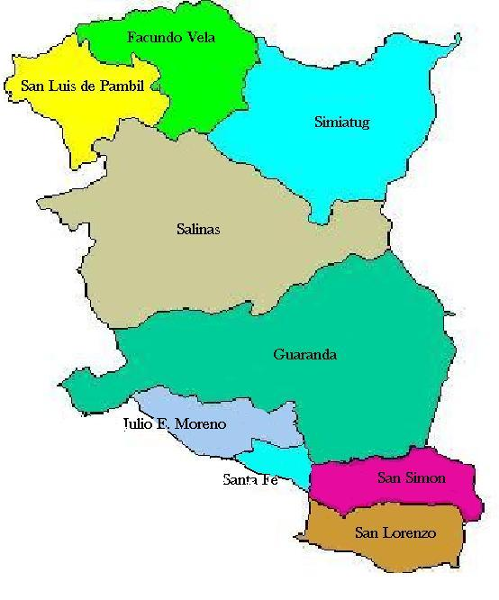 Localización de las parroquias del Cantón Guaranda en la Provincia de Bolívar, Ecuador